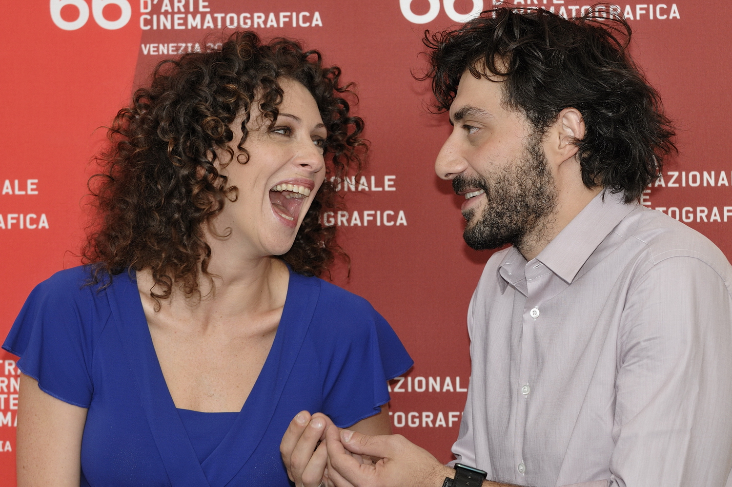 66ème Festival du Cinéma de Venise (Mostra), 9ème jour (10/09/2009)